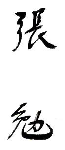 대한민국 부통령과 총리를 역임한 장면의 서명